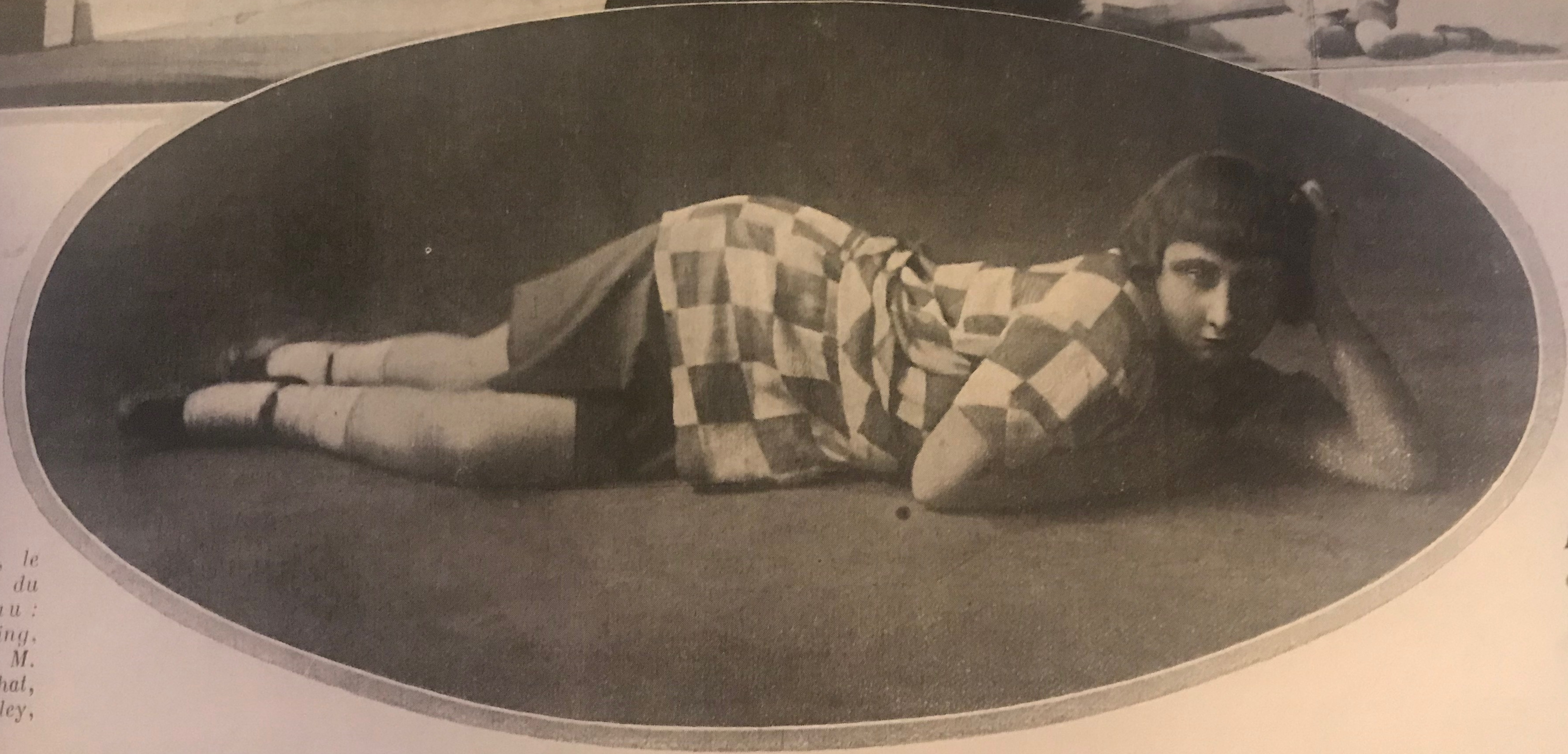 Мария-Тереза Голей в роли Дитя в опере Равеля «Дитя и Волшебство»